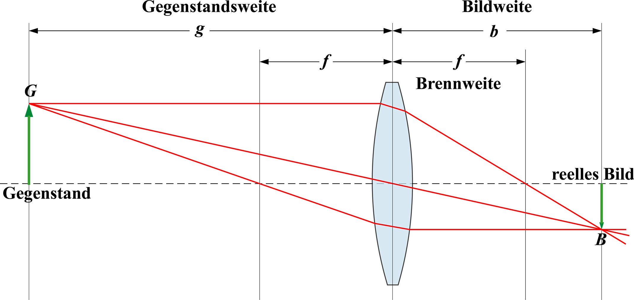 Skizze zur Abbildung mit einer Sammellinse, Bezeichnungen f, g, b, G, B